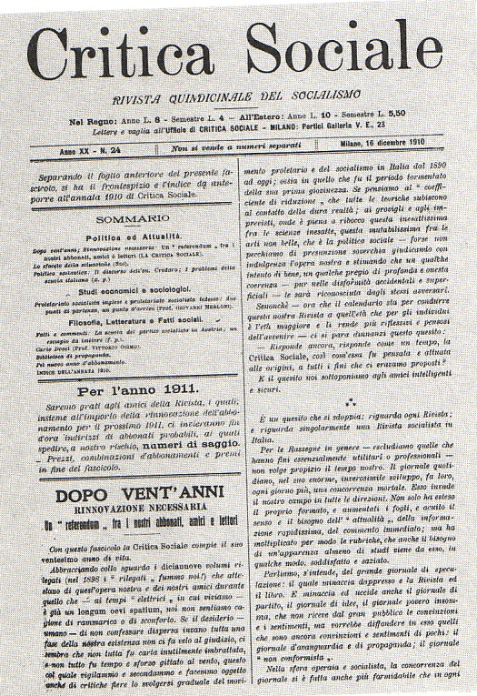 Critica Sociale tratta da Riviste letterarie del Novecento, passata allo scanner, salvata e...storta! (appena ritrovo il testo mi ripropongo di scansionarla meglio)--Paola 17:43, Nov 4, 2004 (UTC)